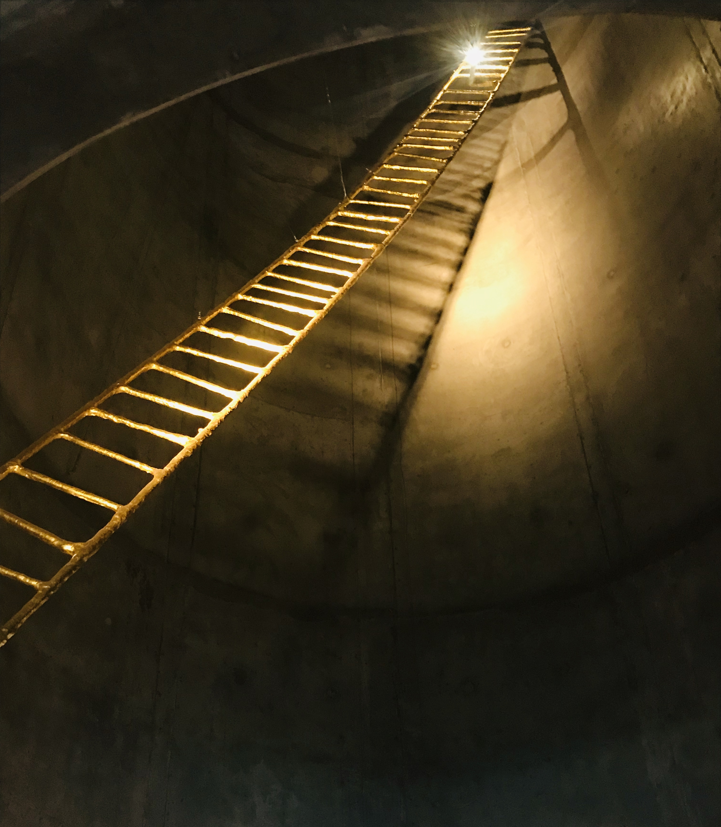 Vergoldete Jakobsleiter im Glockenturm der Nordlichtkathedrale, Alta, Norwegen.